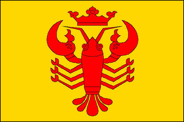 vlajka, Rovensko, okres Šumperk